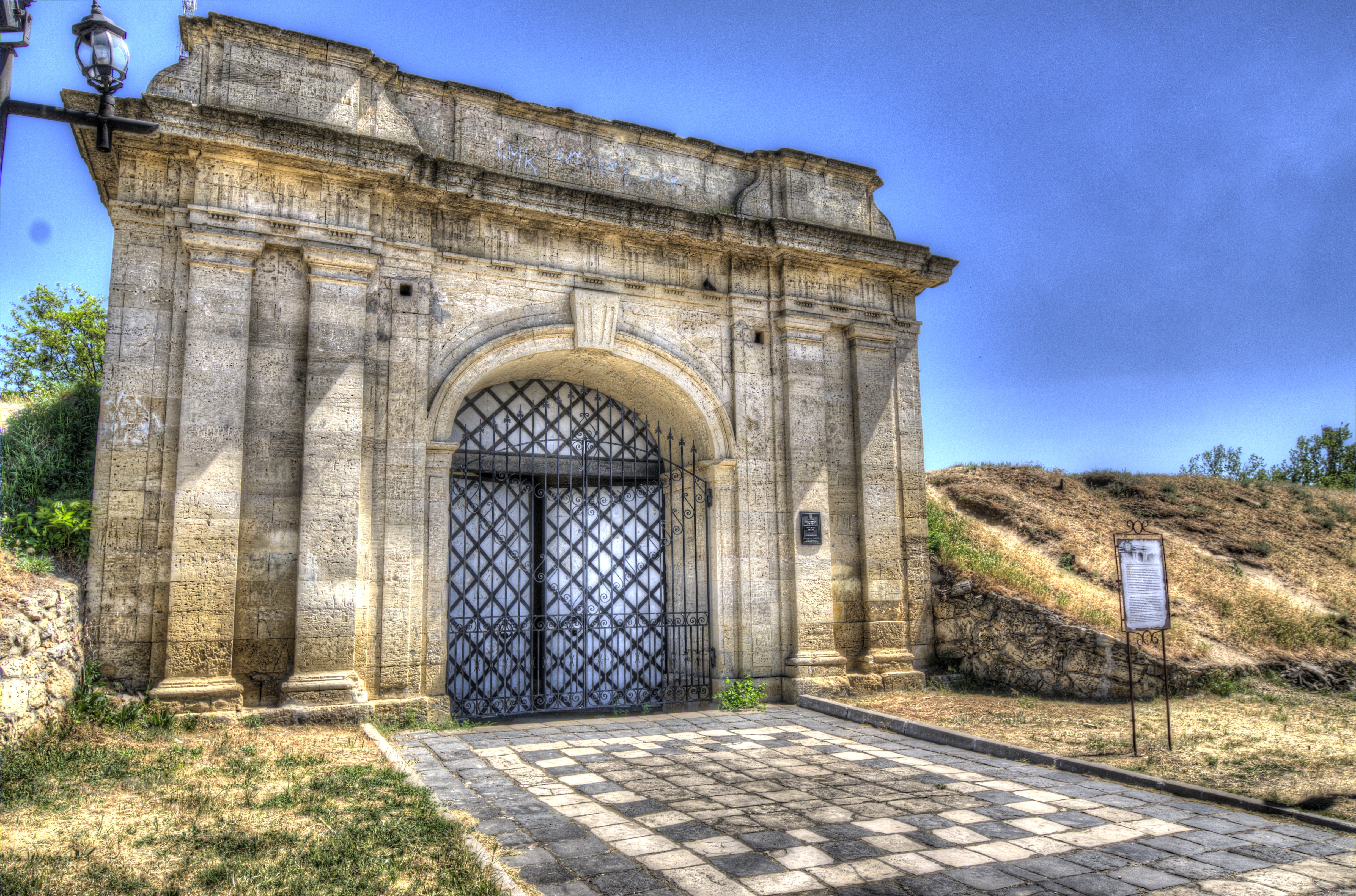 Очаківська південна брама фортеці (мур.), Херсон, Перекопська вул., 13 (Комсомольський парк)